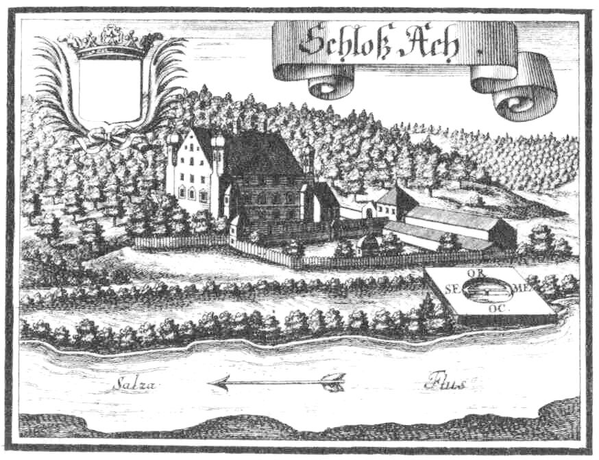 Schloss Ach